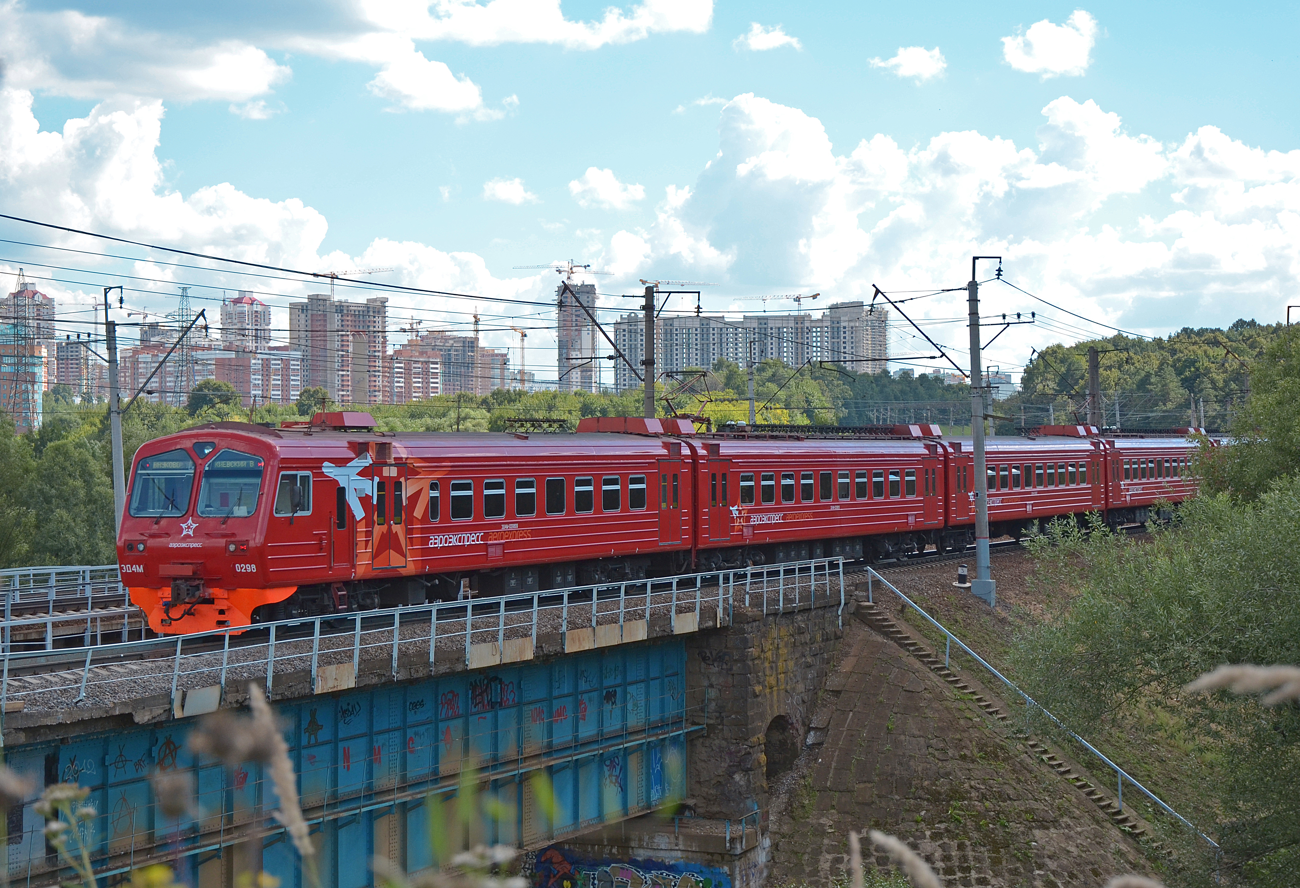 Можно увидеть здесь : You can see here